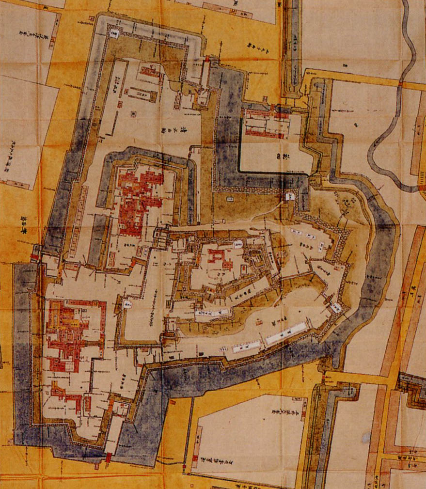 甲府城絵図